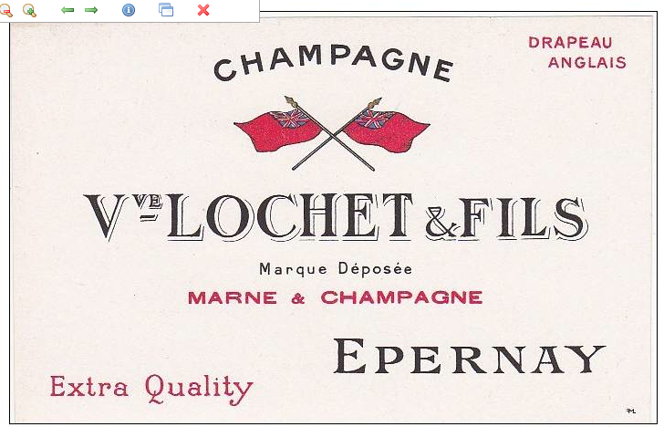 Étiquette de l'ancienne maison de champagne aujourd'hui disparue, Veuve Lochet & fils, fin XIXe siècle. Document graphique ayant plus de 100 ans.